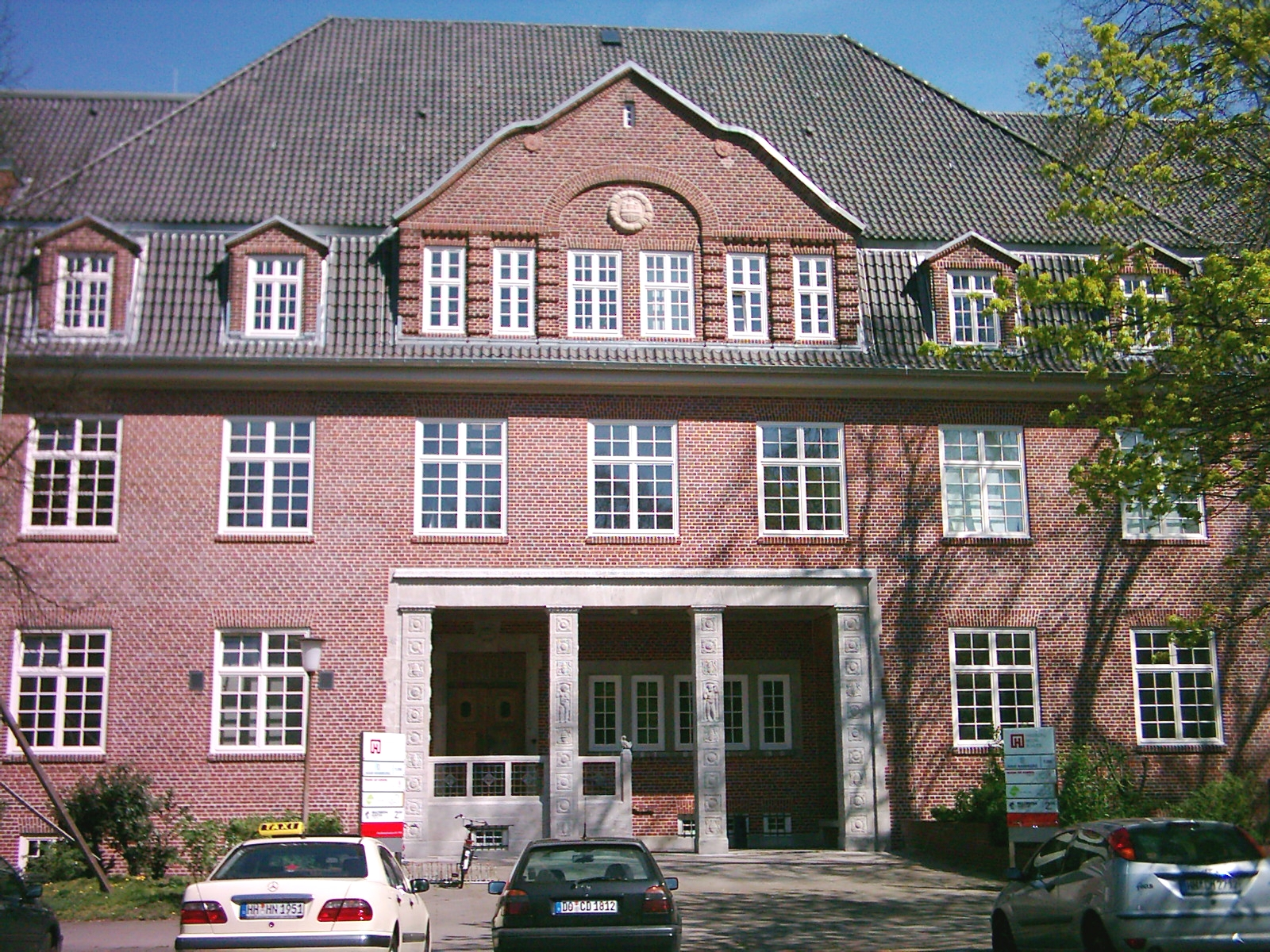 Die ehemalige Frauenklinik Finkenau, Hamburg. Heute genutzt durch die Hamburg Media School, Miami Ad School, Hochschule für Angewandte Wissenschaften Hamburg. This is a photograph of an architectural monument.